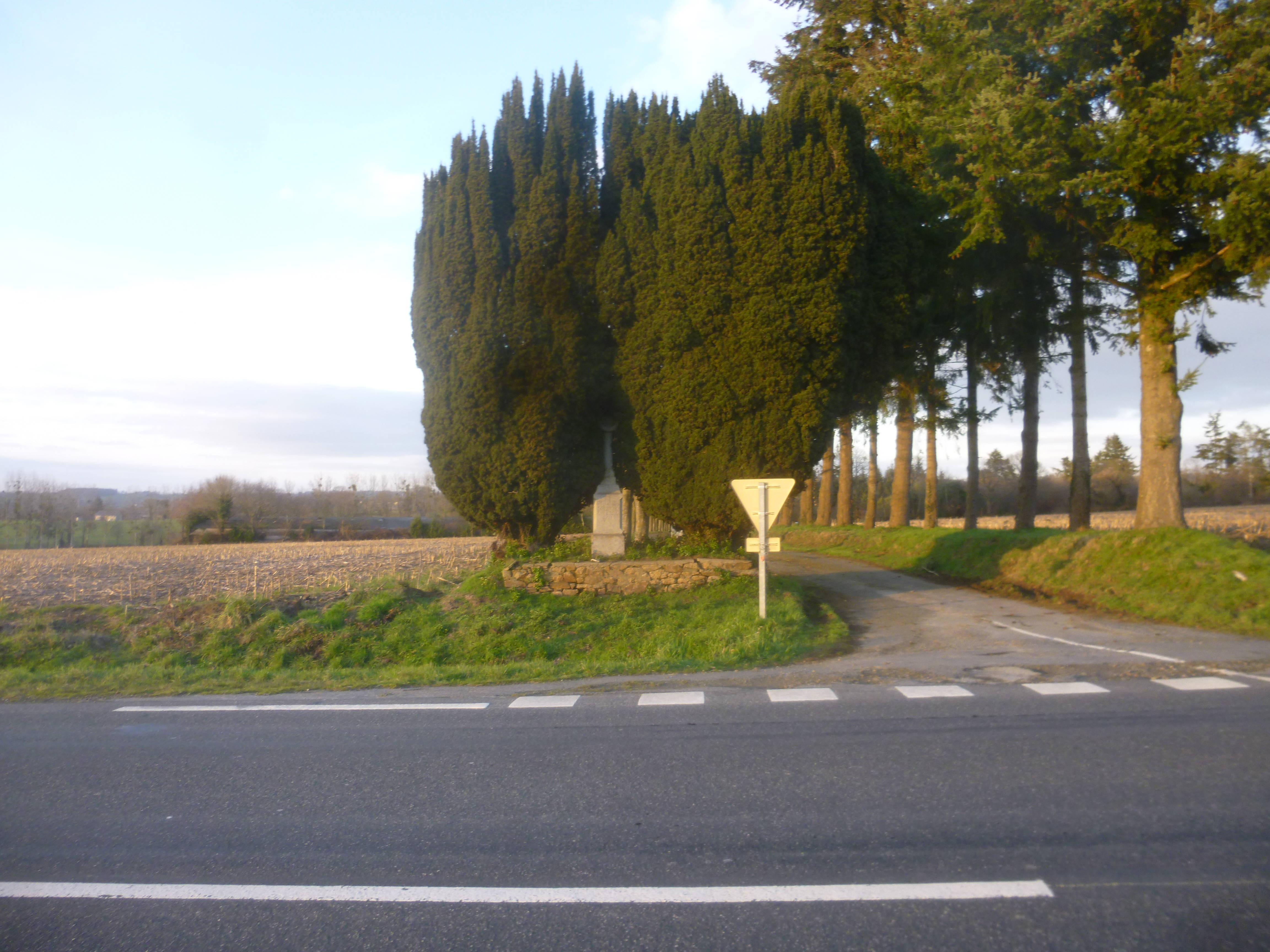 La Croix de l'Angevinière, située dans la commune de La Chapelle-Janson, entre Fleurigné et La Pellerine.